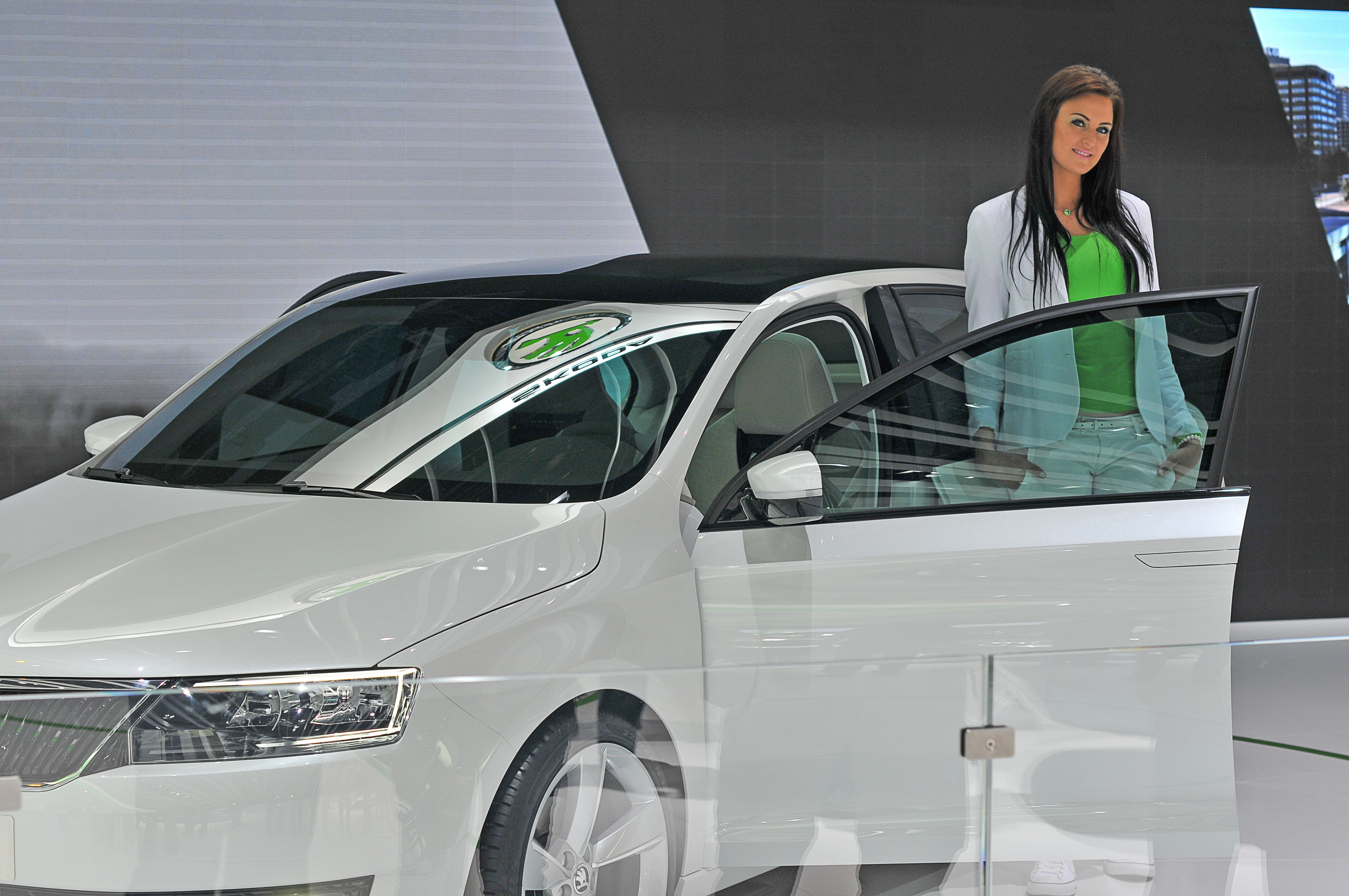 IAA 2011